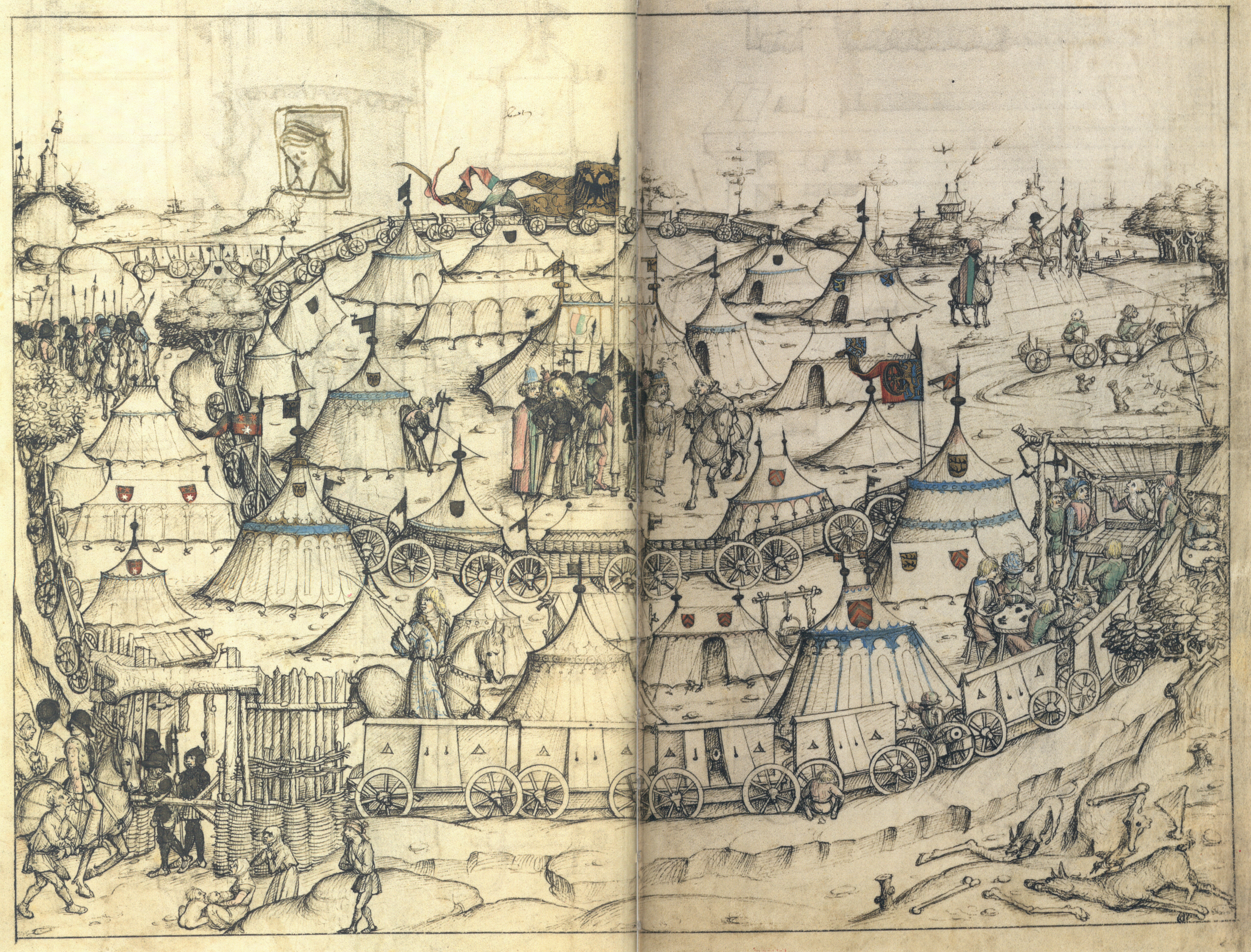 Mittelalterliches Hausbuch von Schloss Wolfegg Fol. 53r–53r1: Heerlager (Wagenburg)